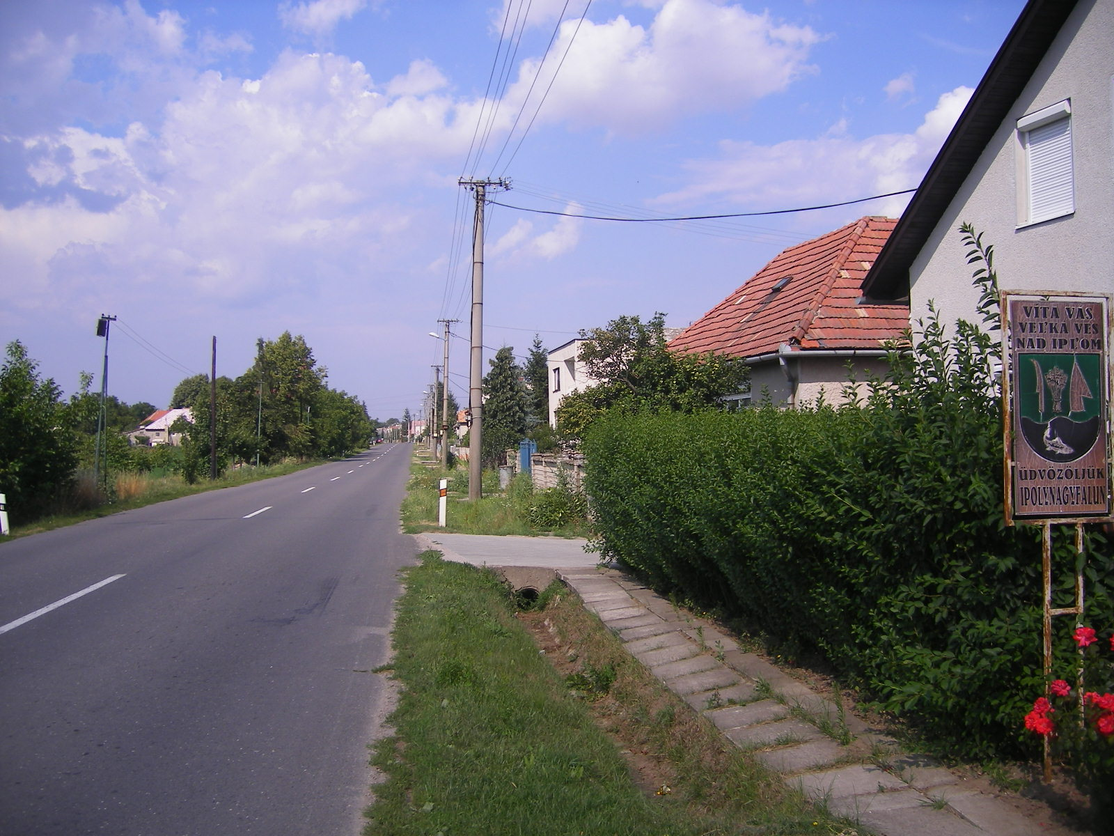 Ipolynagyfalu - az 527-es út a falu nyugati szélén